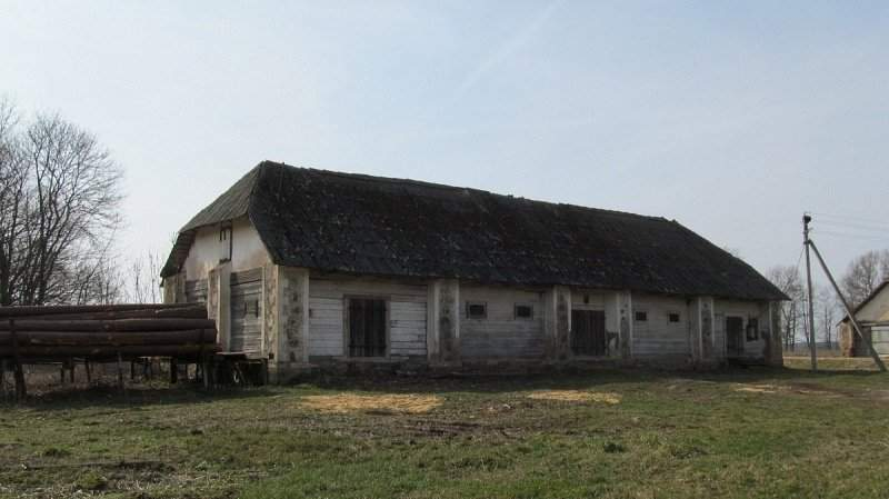 Сунаі. Рэшткі сядзібна-паркавага комплексу ”Пукава”